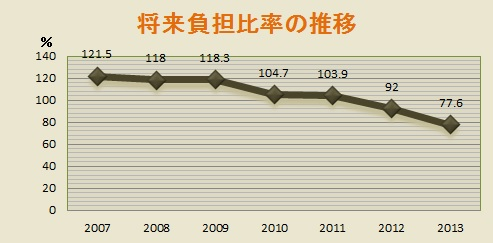 将来負担比率の推移